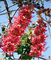 ประดู่แดง